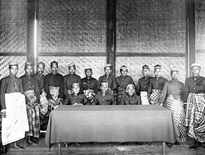 Repronegatief. Districtshoofden van Bone, Celebes